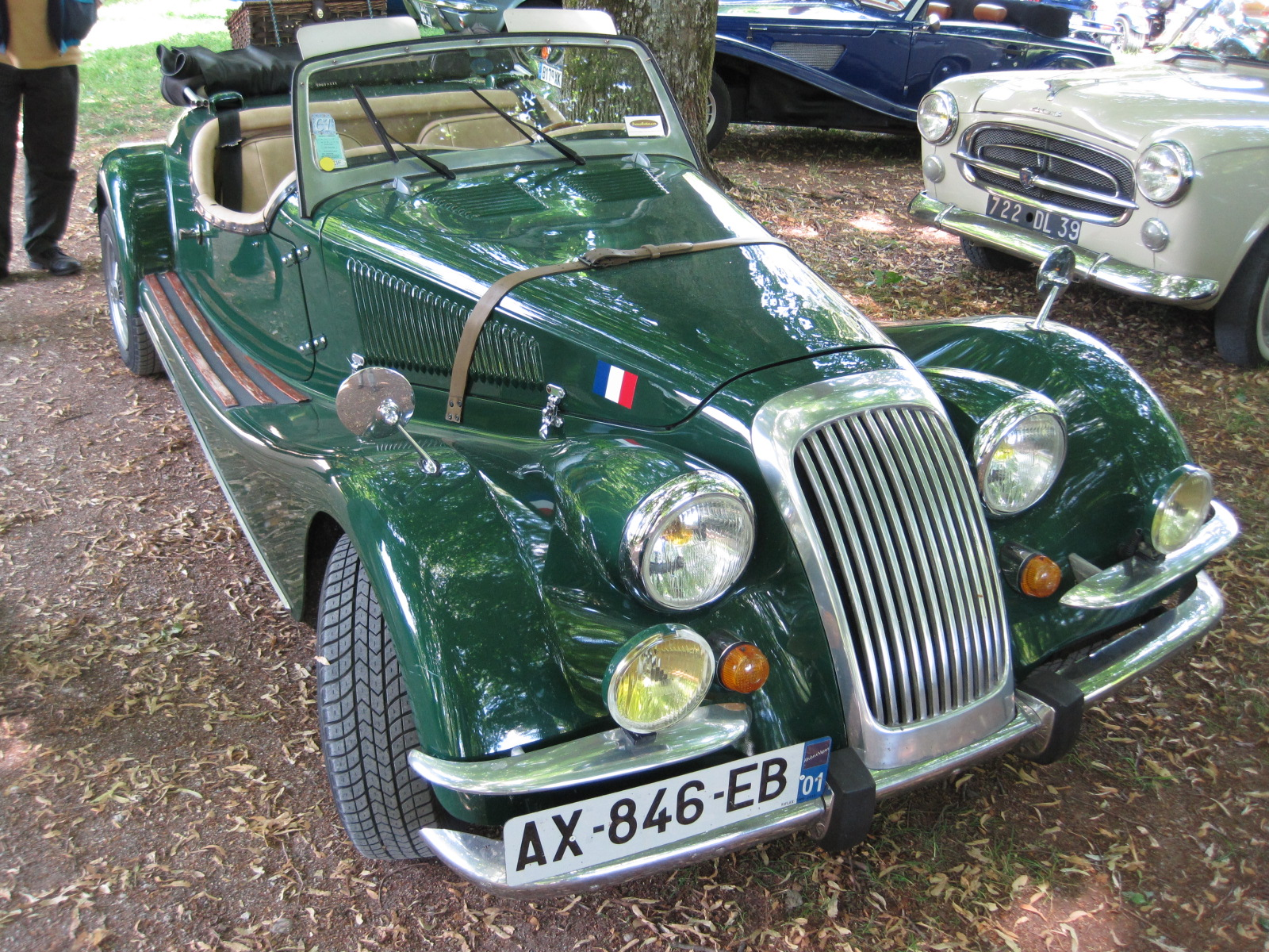 SMS Tilbury